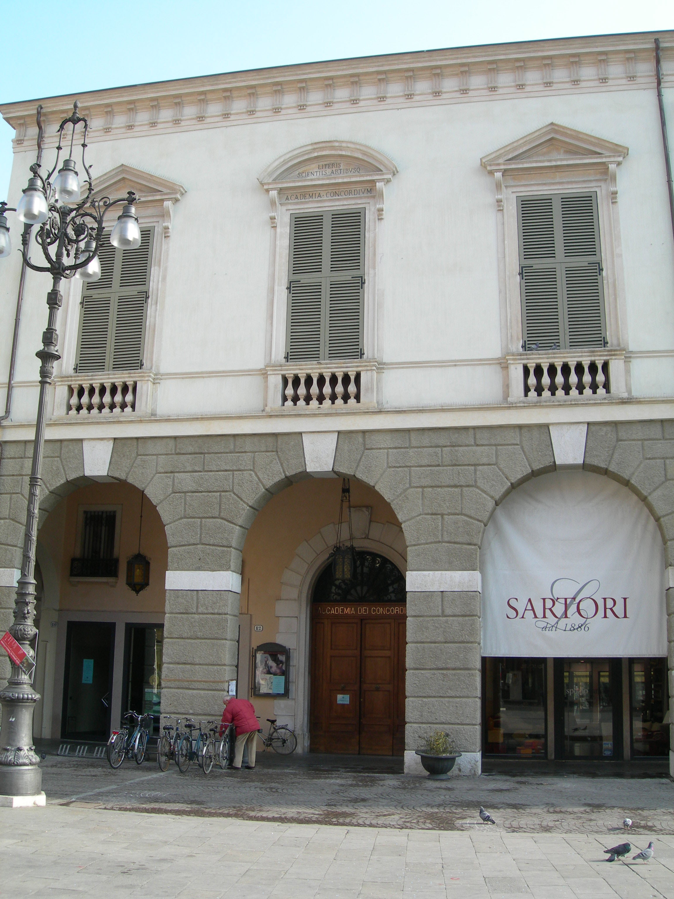 Facciata del palazzo che ospita l'Accademia dei Concordi a Rovigo.